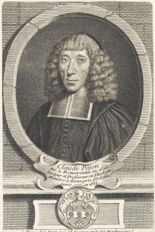 Claude Pajon (1626-1685), Docteur et Professeur en Théologie